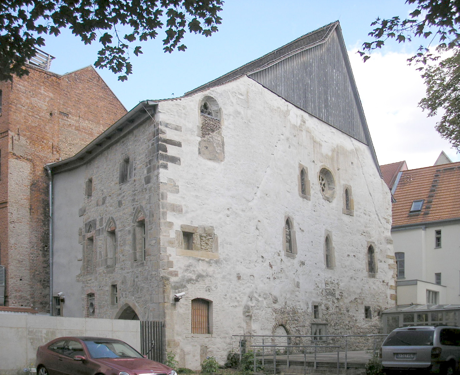 Die Alte Synagoge in der Waagegasse - Erfurt, Thüringen, Deutschland.